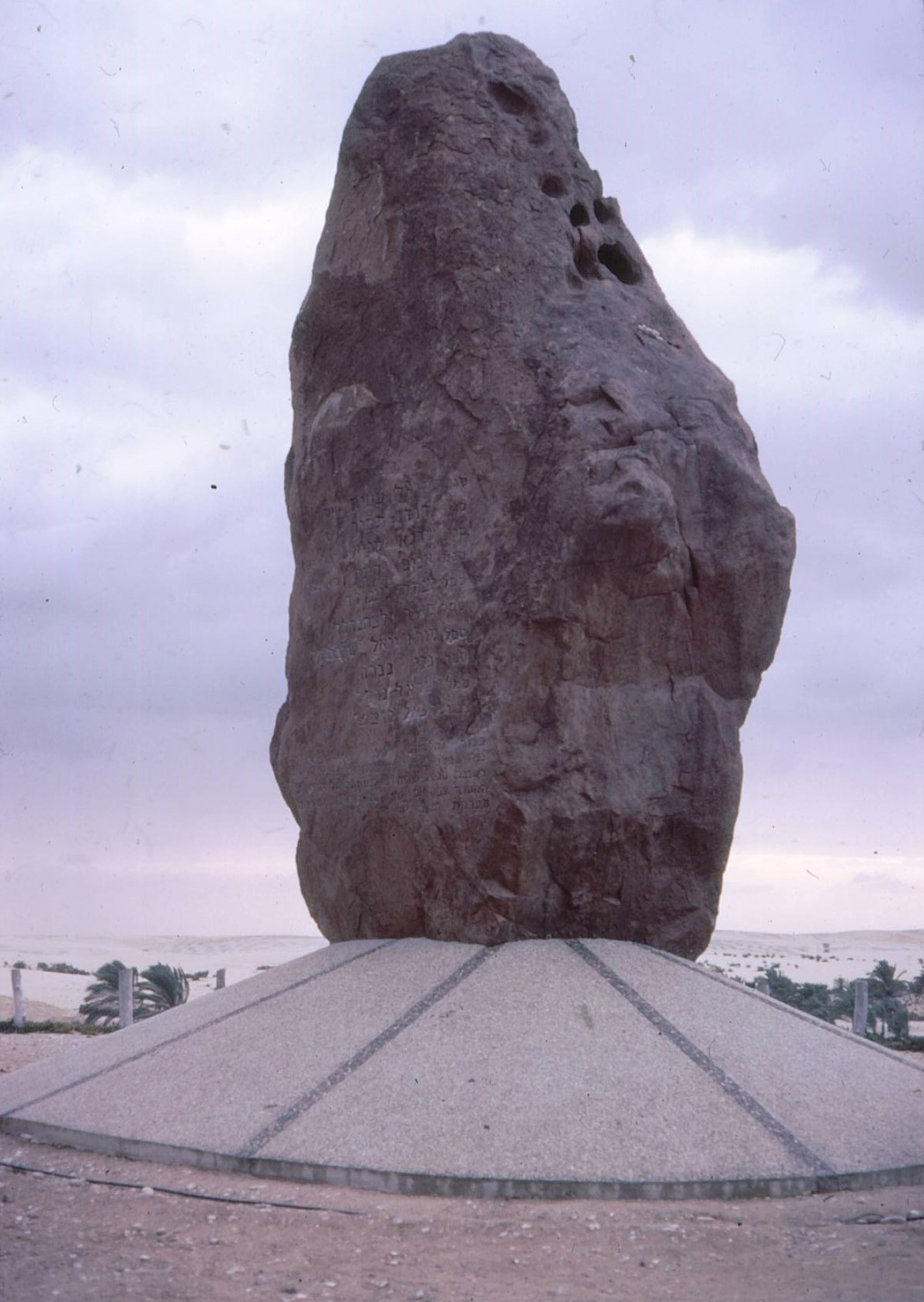 Dayan Rock